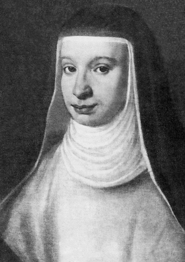 Maria Celeste, born Virginia Galilei (1600-1634)